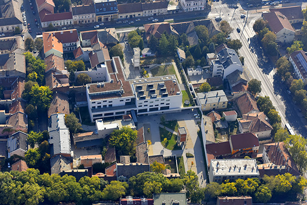 Szent-Györgyi Albert Agóra - légi fotó